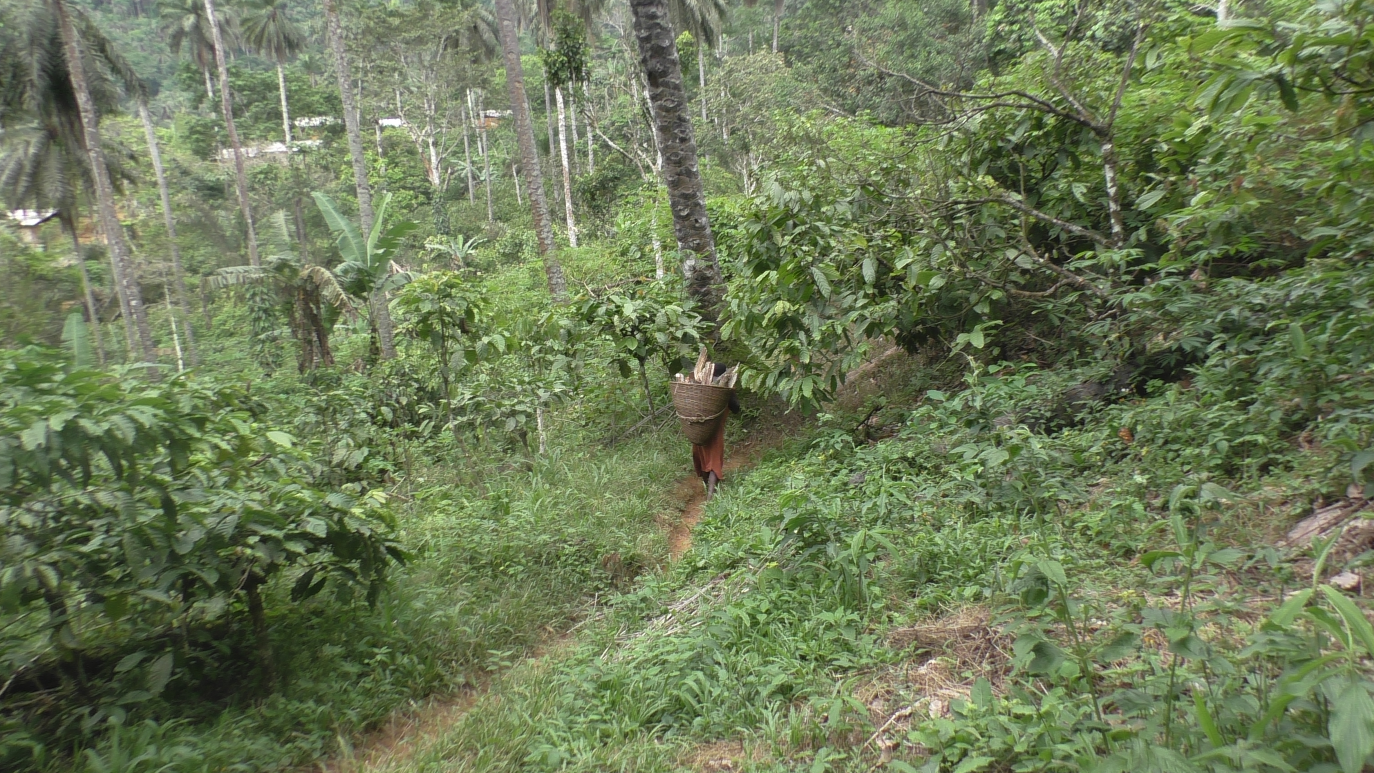 Sanctuaire de Bayang Mbo